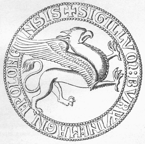 Heinrich Borwin I., Fürst zu Mecklenburg -1219